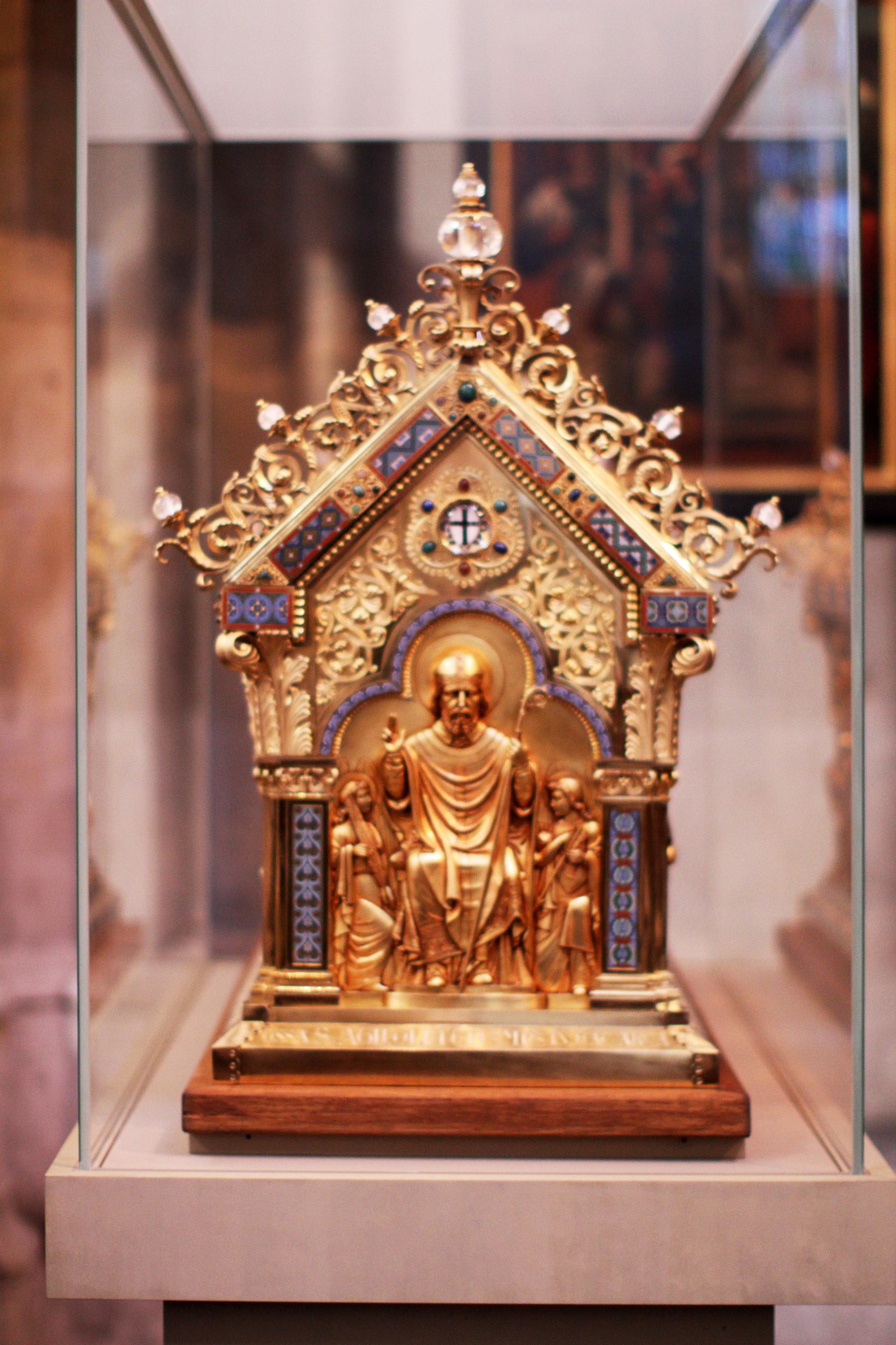 Dom zu Köln, Schrein des Agilolphus von Köln